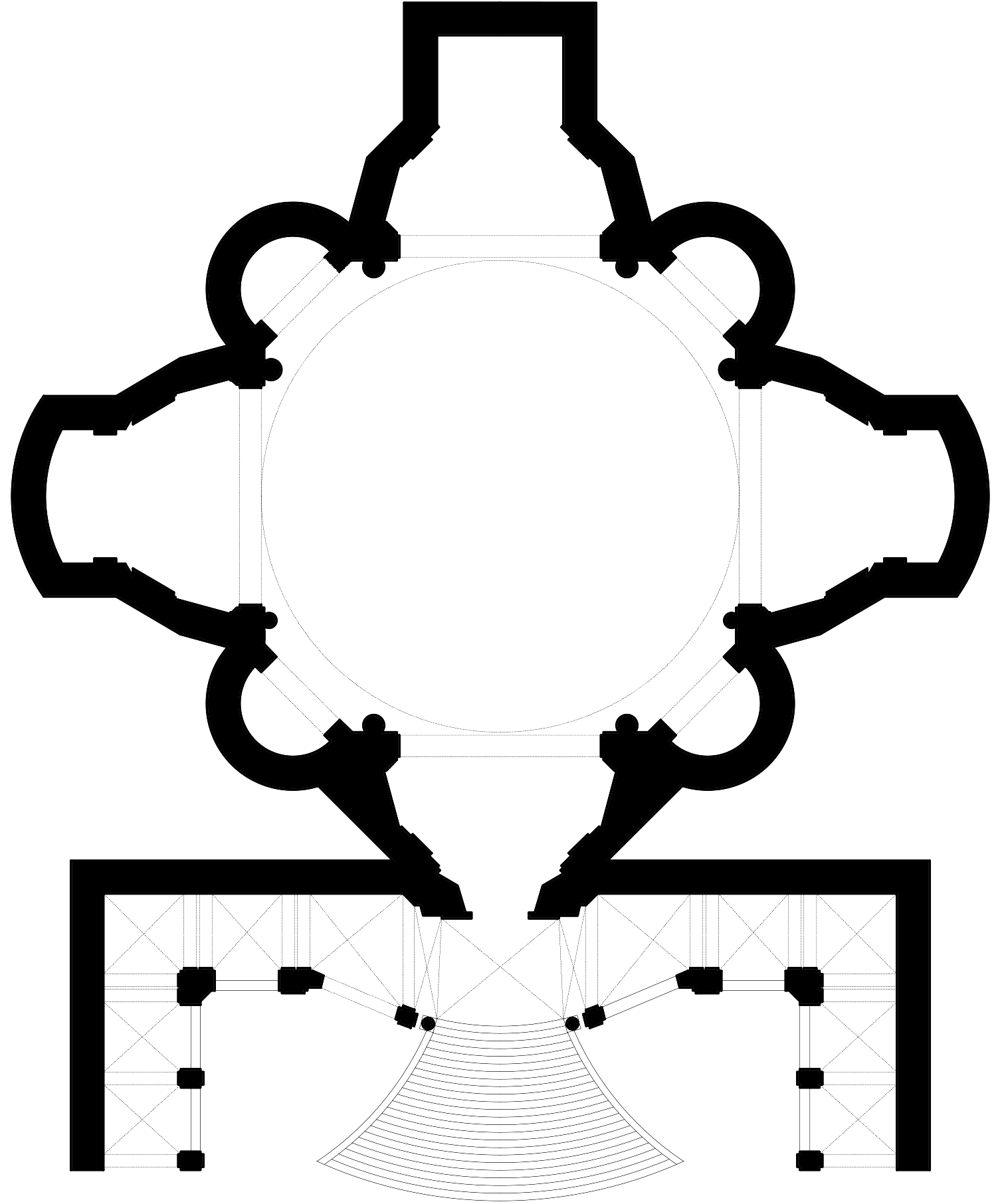 Versione PNG del progetto di Cosimo Fanzago.